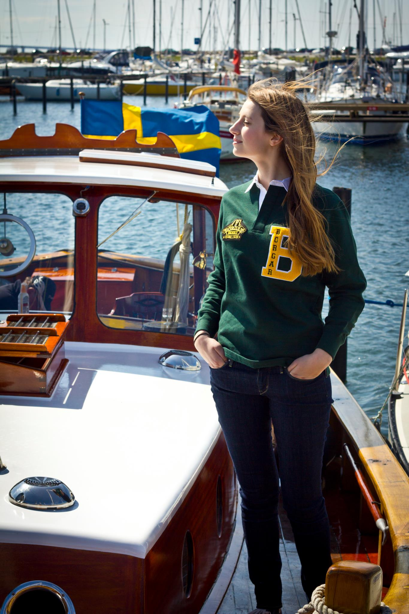 Den fria Elevkåren vid Malmö Borgarskola har ett av Sveriges största kårklädessortiment